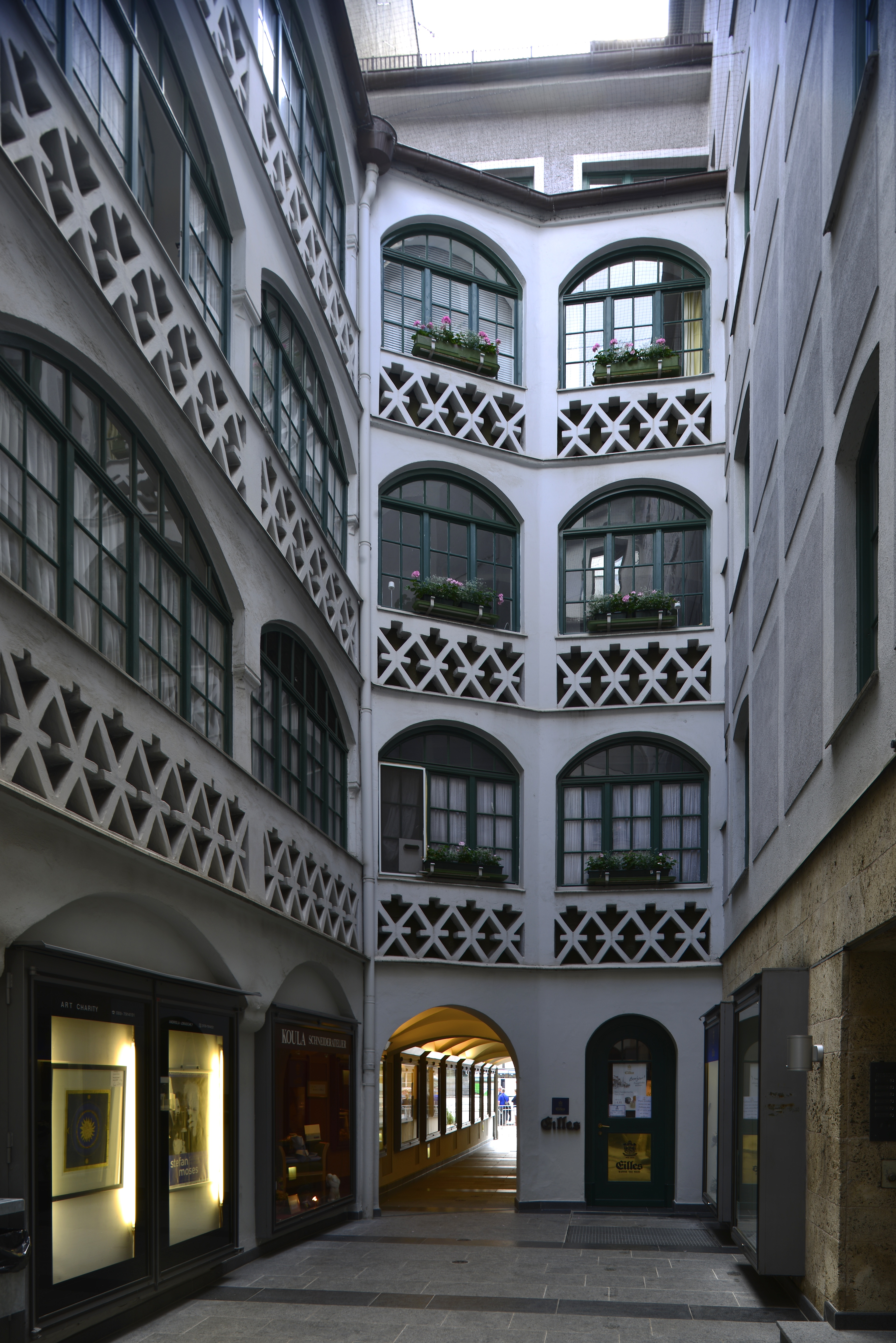 München, Residenzstraße 13. Innenhoffassade eines alten Bürgerhauses, in den Jahren 1714 bis 1803 Bestandteil des Püttrichklosters.